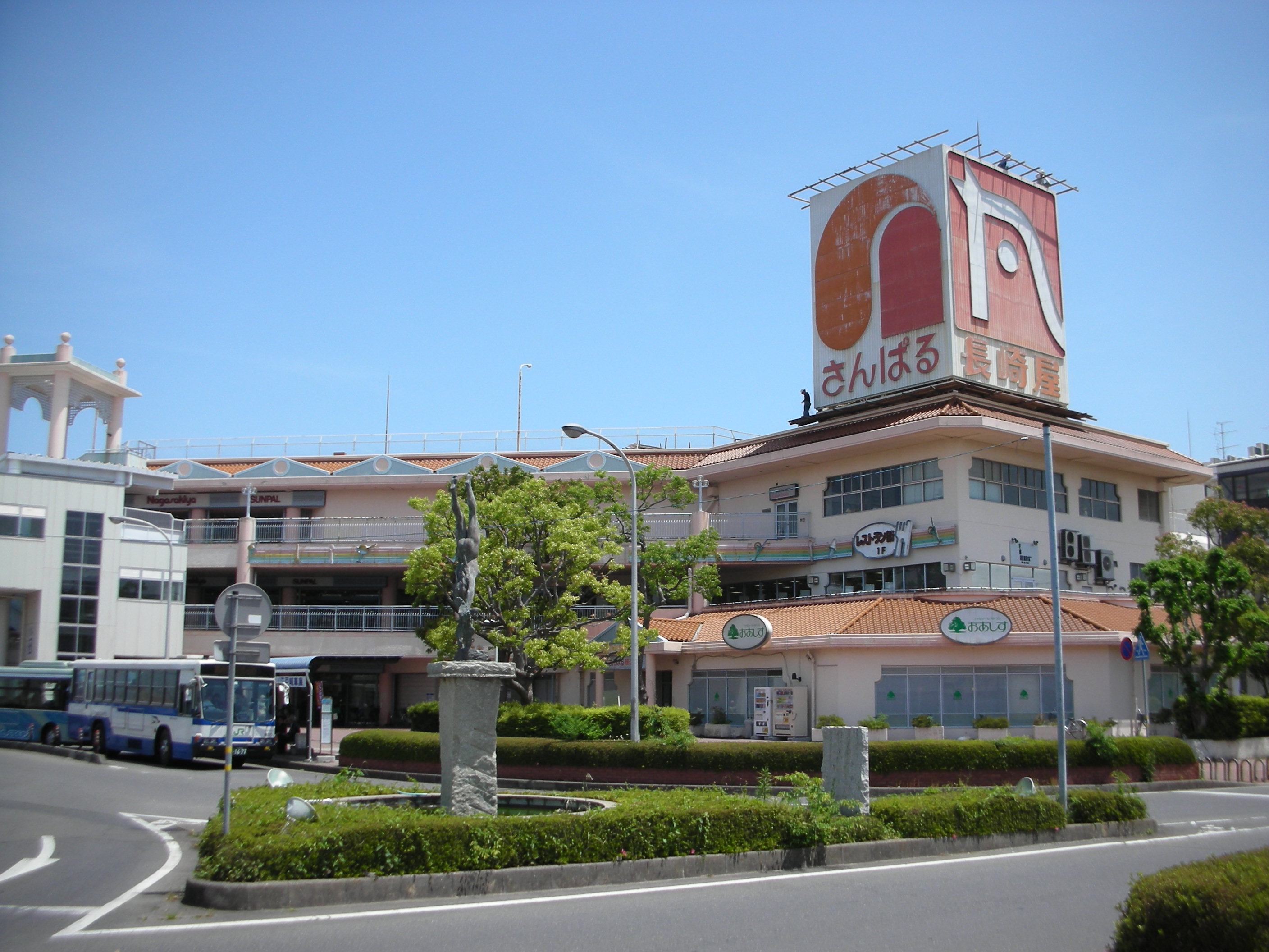 長崎屋荒川沖店の外観